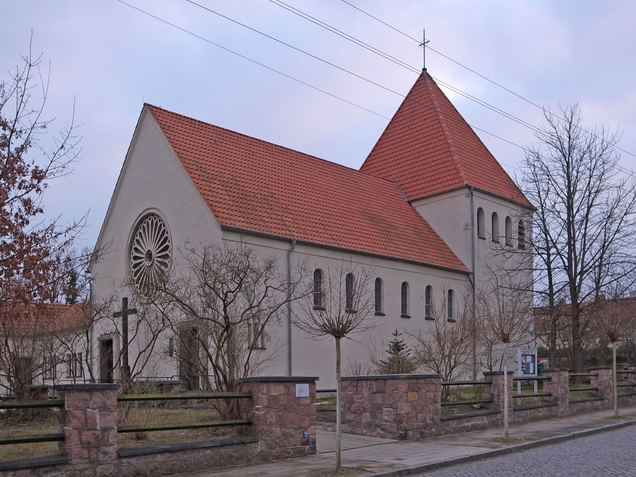 Bitterfeld-Wolfen, Ortsteil Wolfen, Heilig-Kreuz-Kirche (Baudenkmal im Denkmalverzeichniss Sachsen-Anhalt, Erfassungsnummer: 094 95707 000 000 000 000 [1])